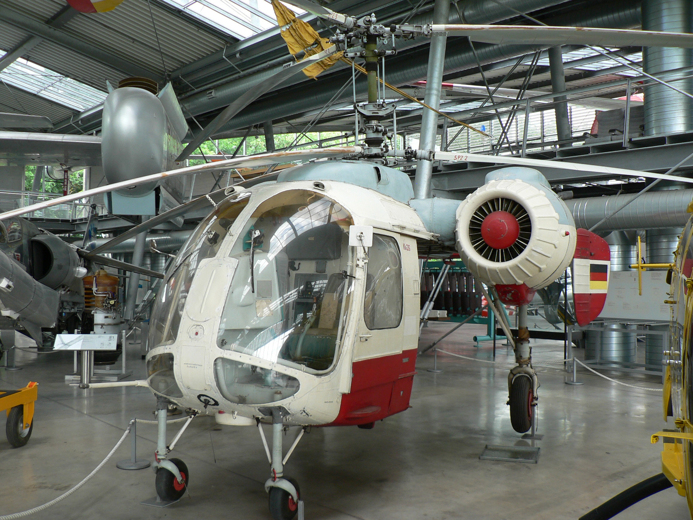 Deutsches Museum Schleissheim Photo by Jean-Patrick Donzey